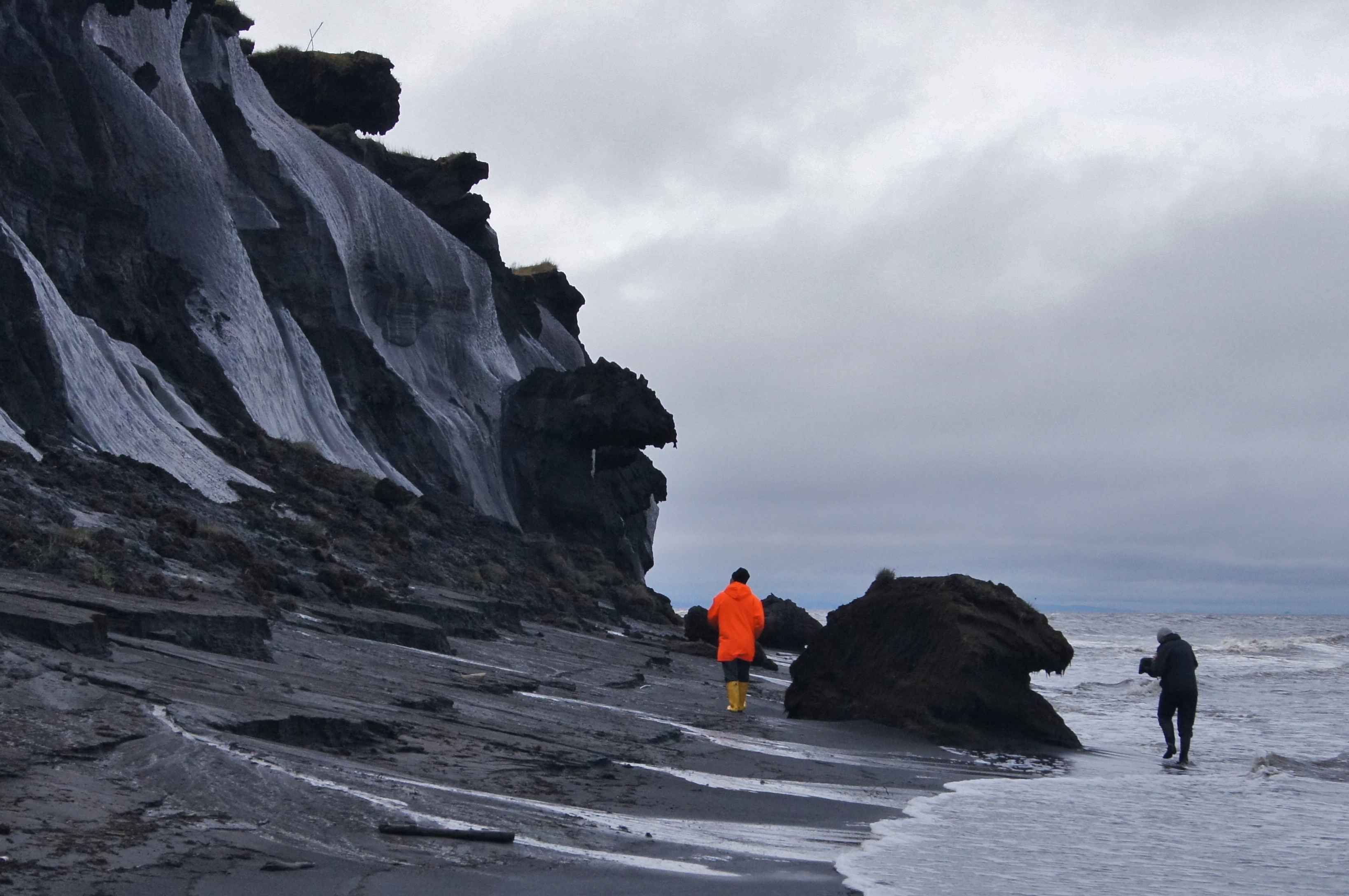 Forscher des Alfred-Wegener-Institutes für Polar- und Meeresforschung beim Begutachten der Küstenabbrüche